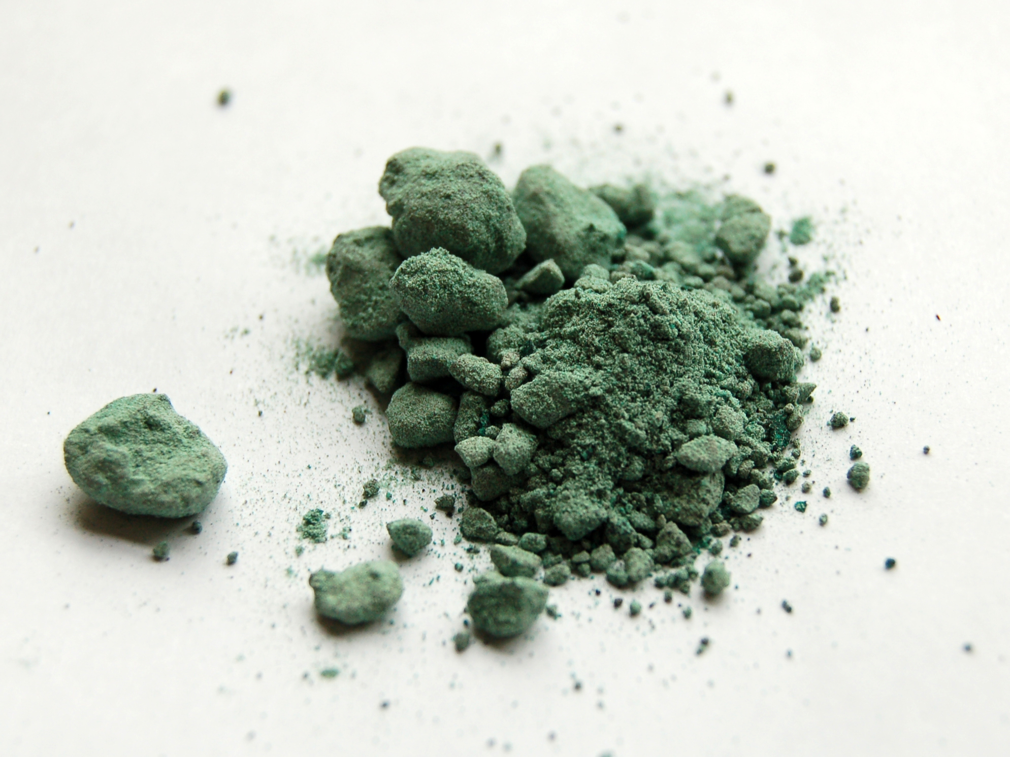 Copper(I) bromide sample